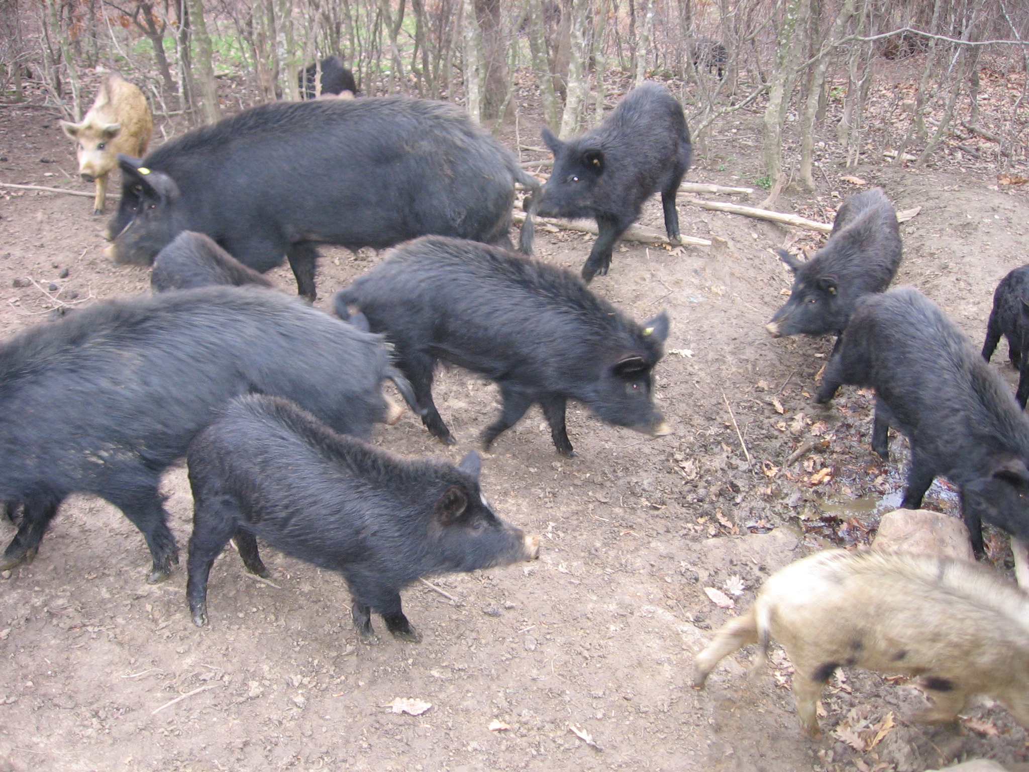 East Balkan Swine